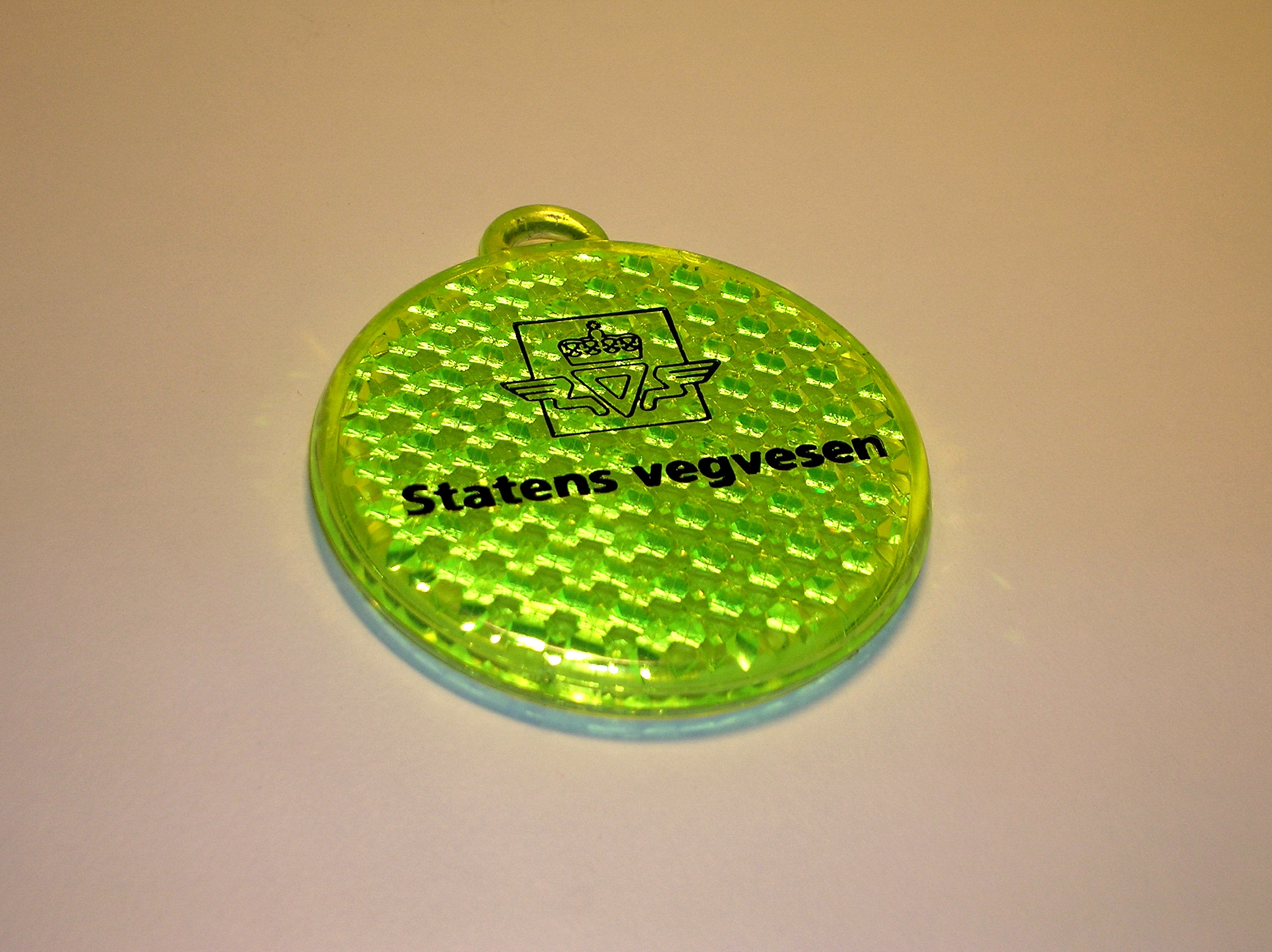 A retroreflecktor/Refleks